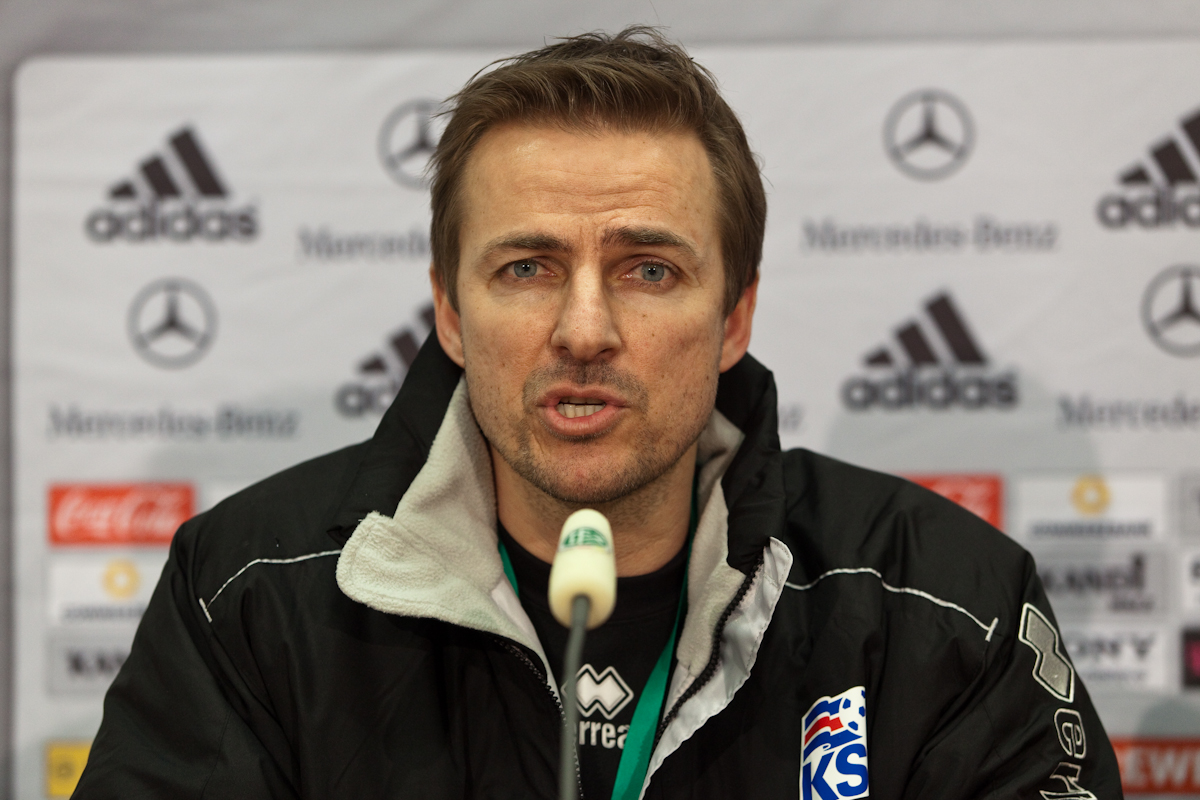 Islands U-21-Trainer Eyjólfur Sverrisson.